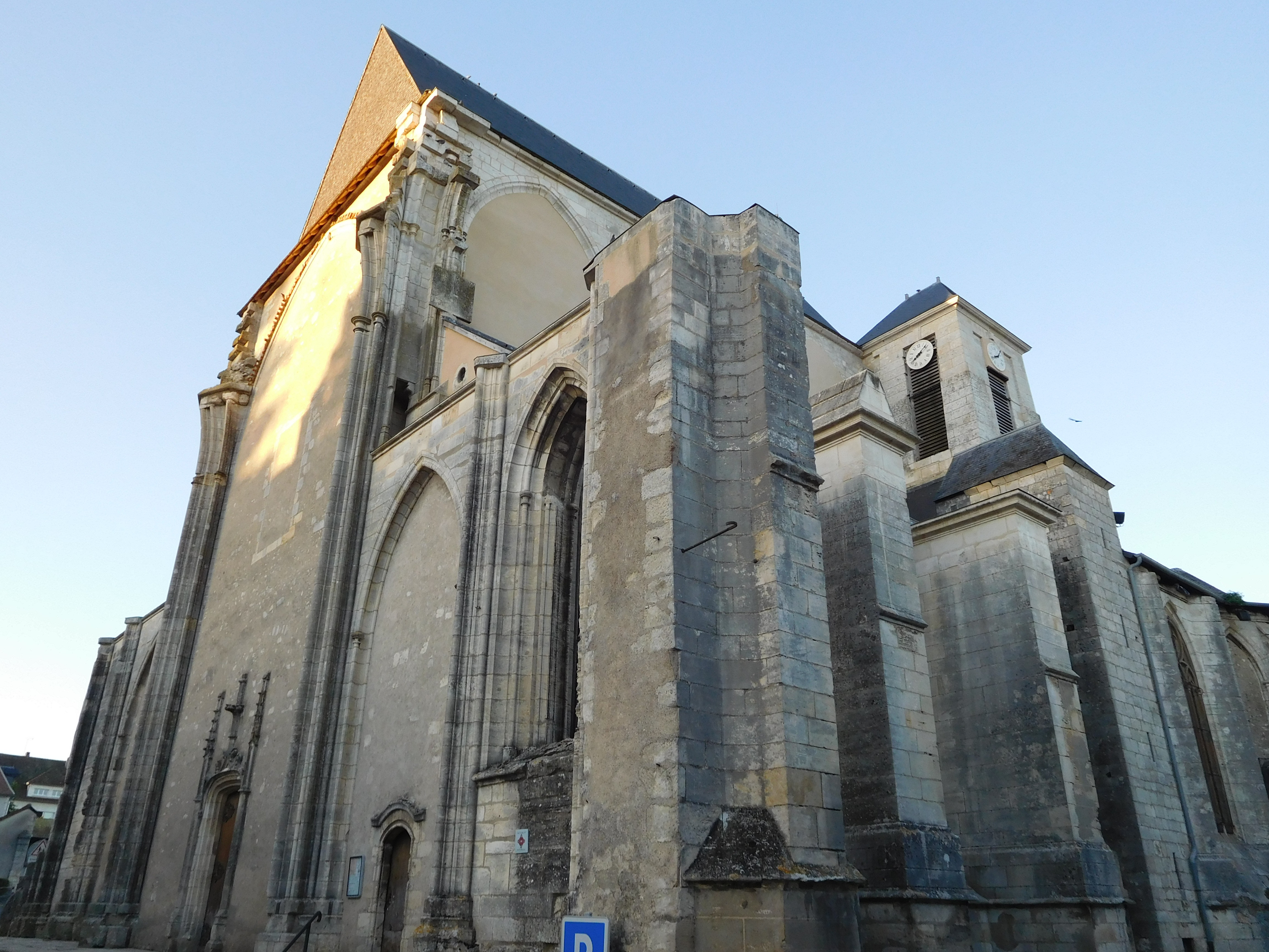 Abbaye de Saint-Satur, vue de la rue principale.